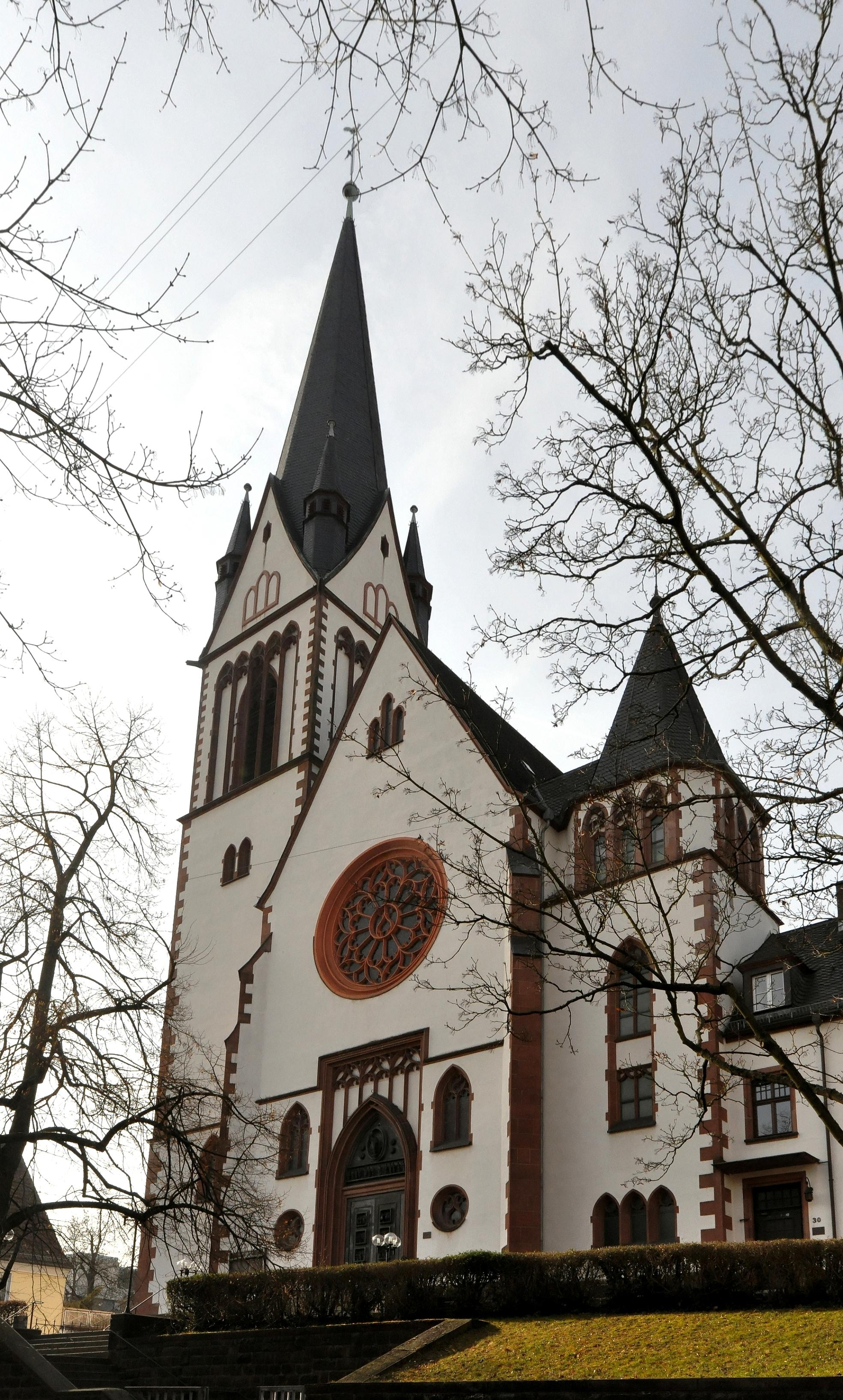 Bonifatiuskirche Gießen, katholisch